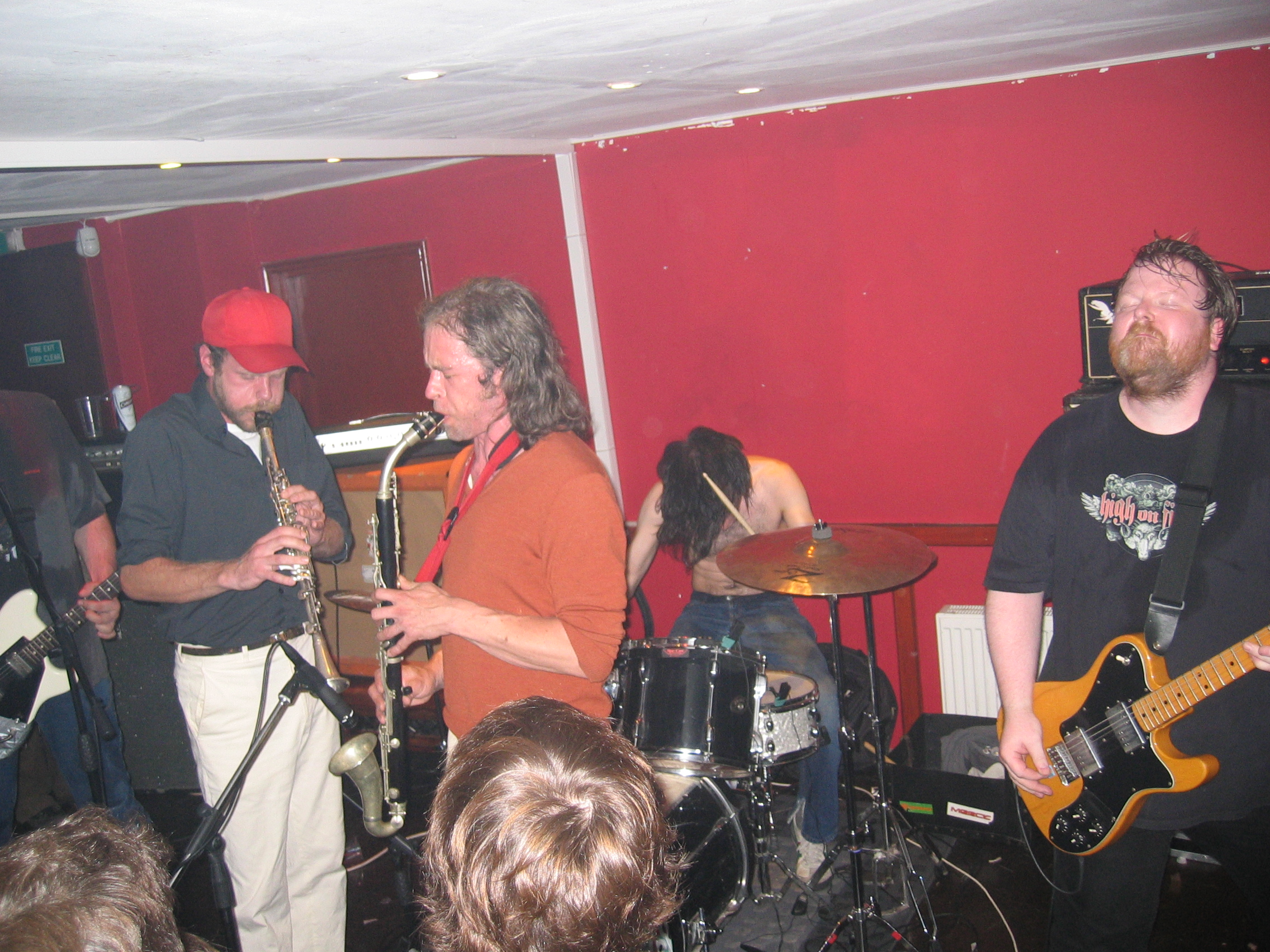 Part Chimp. Bardens Boudoir, London, Dalston